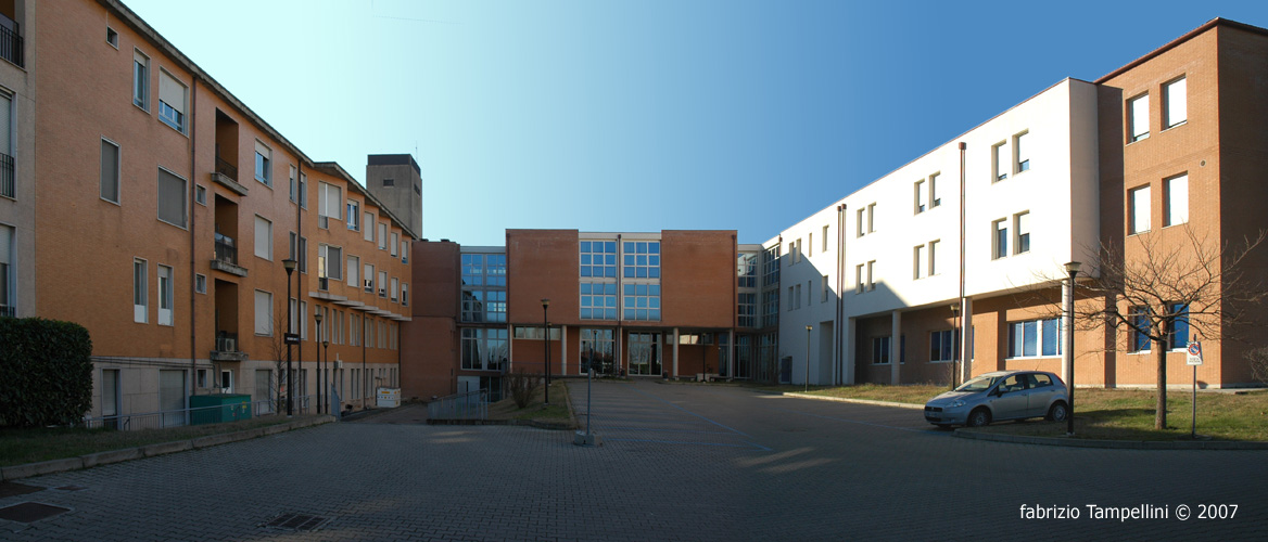 Ospedale Dall' interno